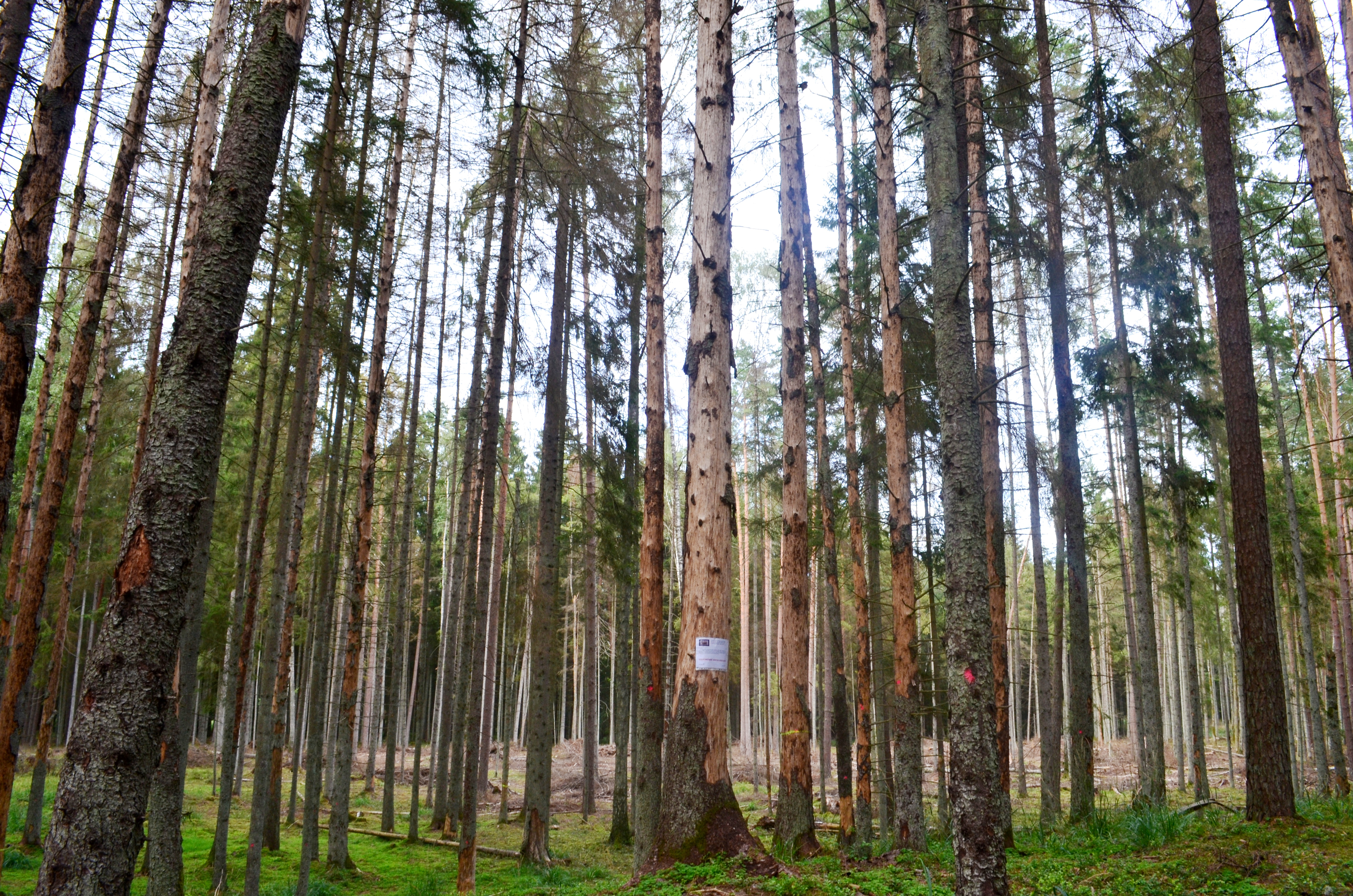 Punios šilas, Alytaus raj.